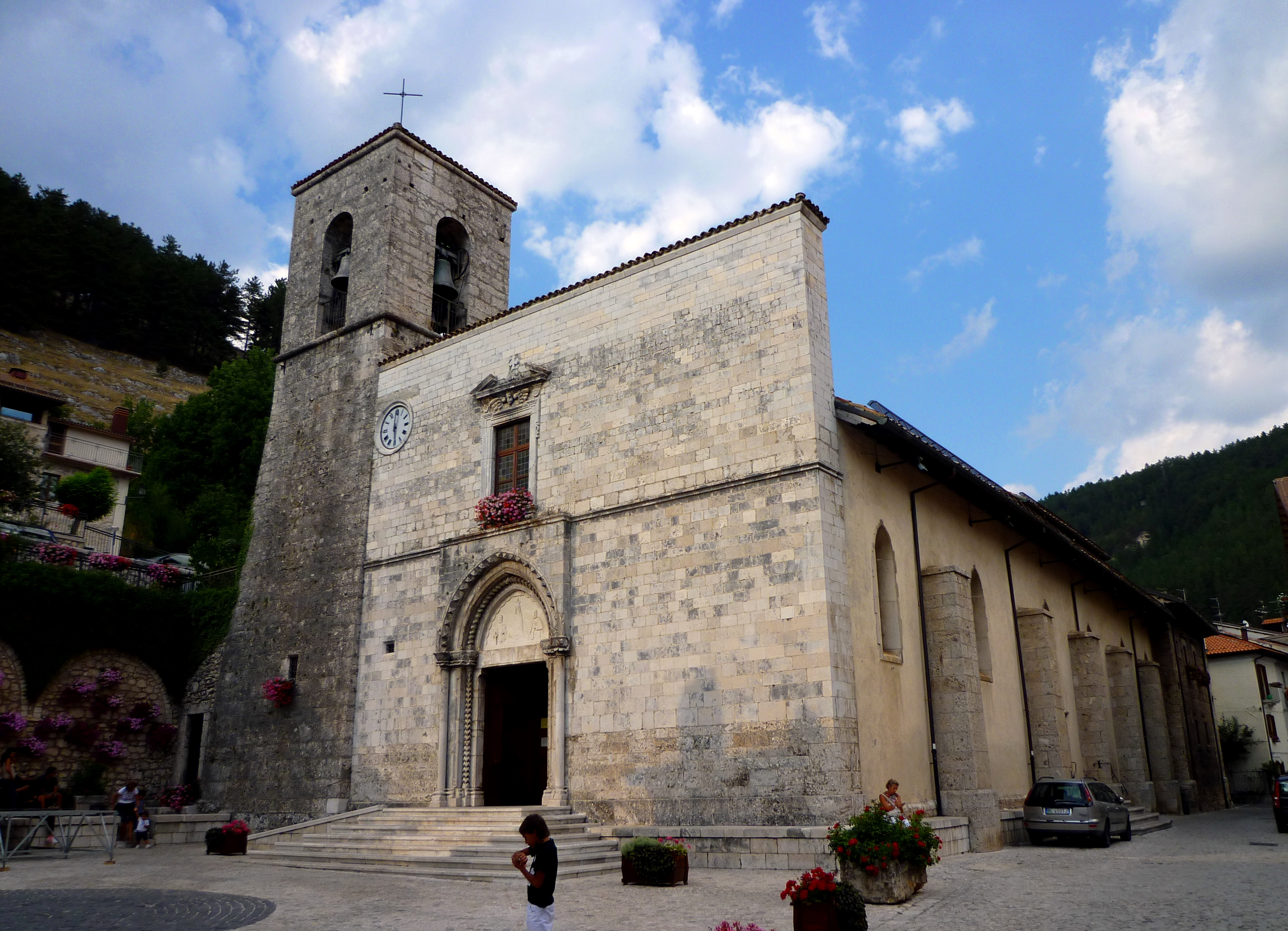 Esterno della chiesa dei Santi Pietro e Paolo a Pescasseroli (AQ)